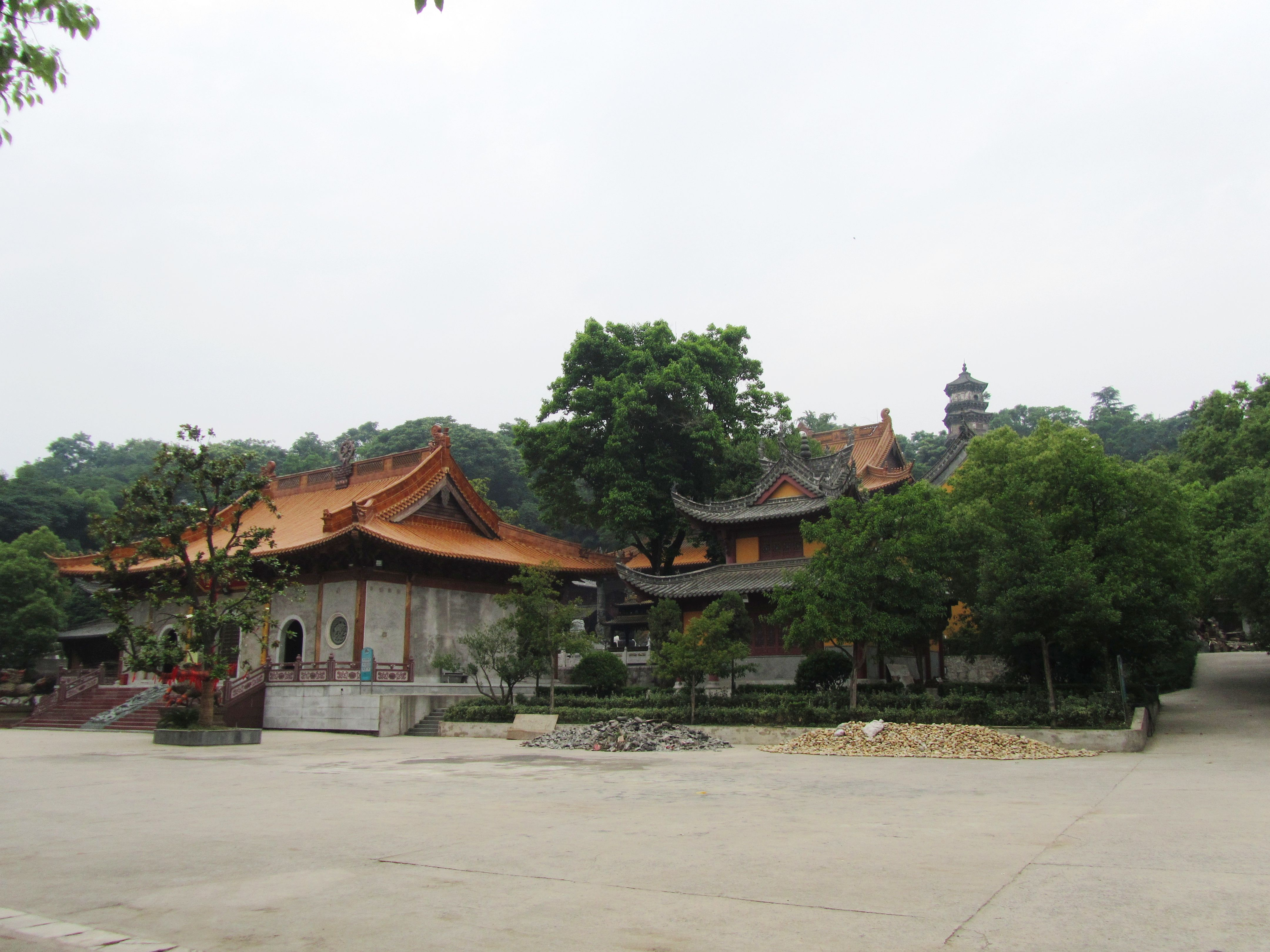 芜湖广济寺全景。